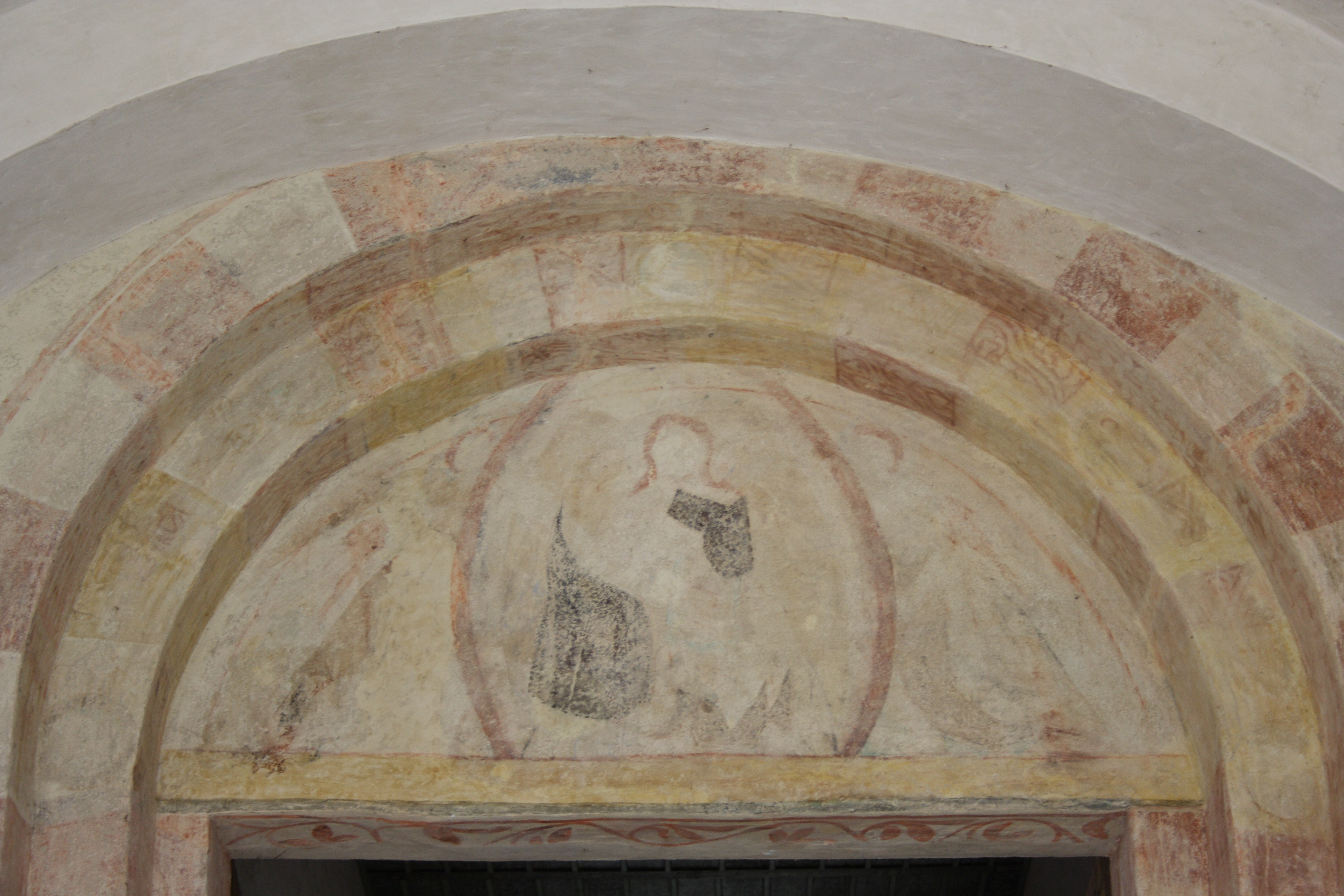 Evangelische Pfarrkirche, ehemalige Benediktinerklosterkirche St. Maria in Auhausen im Landkreis Donau-Ries (Bayern), Malereifragment des Tympanons über dem Portal der Vorhalle aus dem 13./14. Jahrhundert, Darstellung: Christus in der Mandorla zwischen Engeln